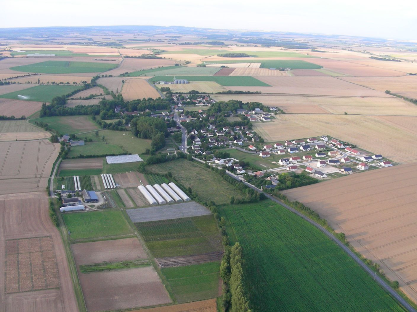 Saint Michel de Volangis (vue du sud)